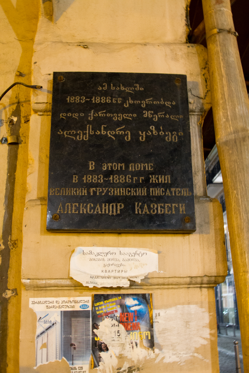 Batumi, GE @ Feb. 2014